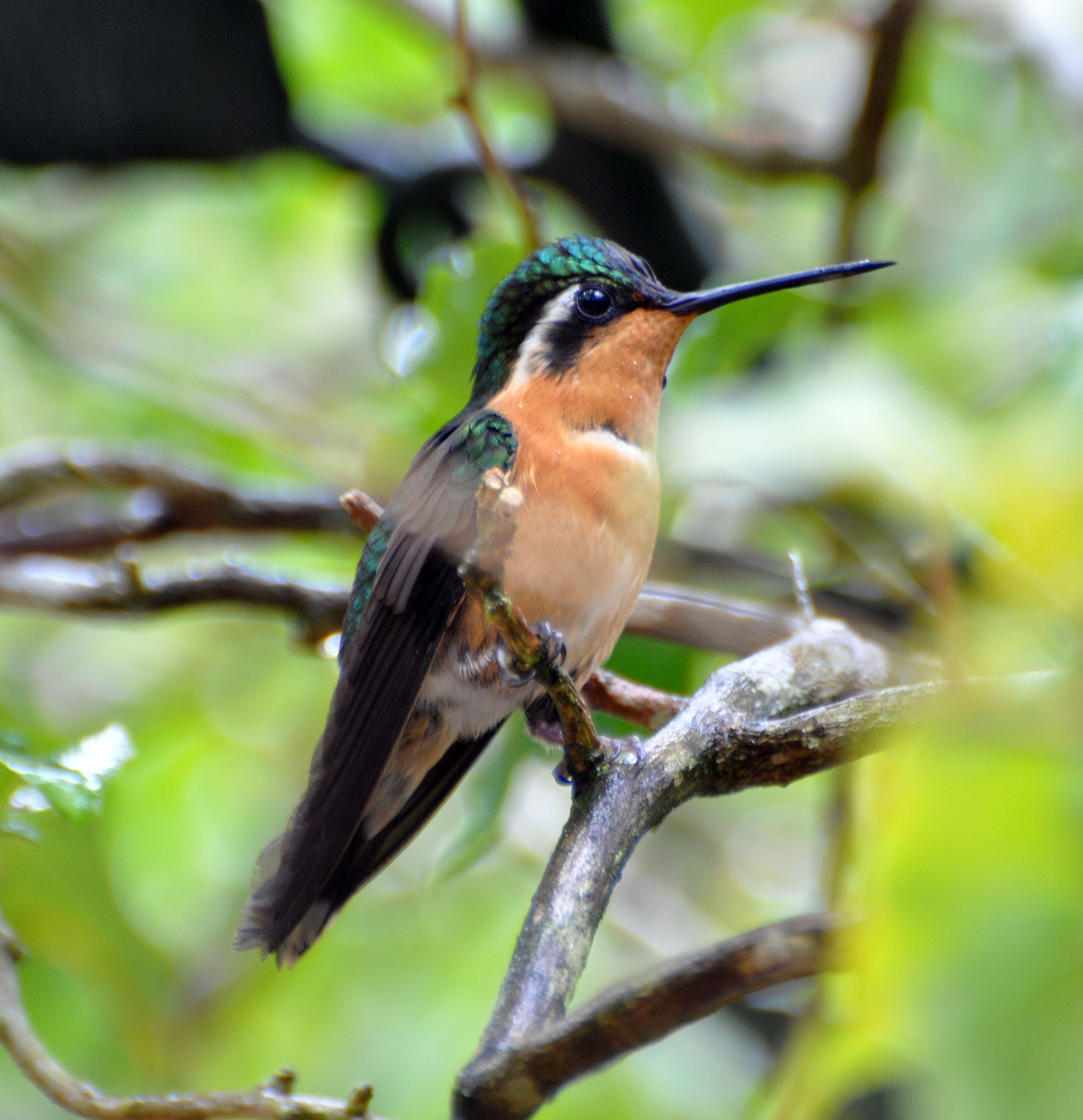 Lampornis calolaemus pectoralis 18-Mar-12 La Paz, Costa Rica